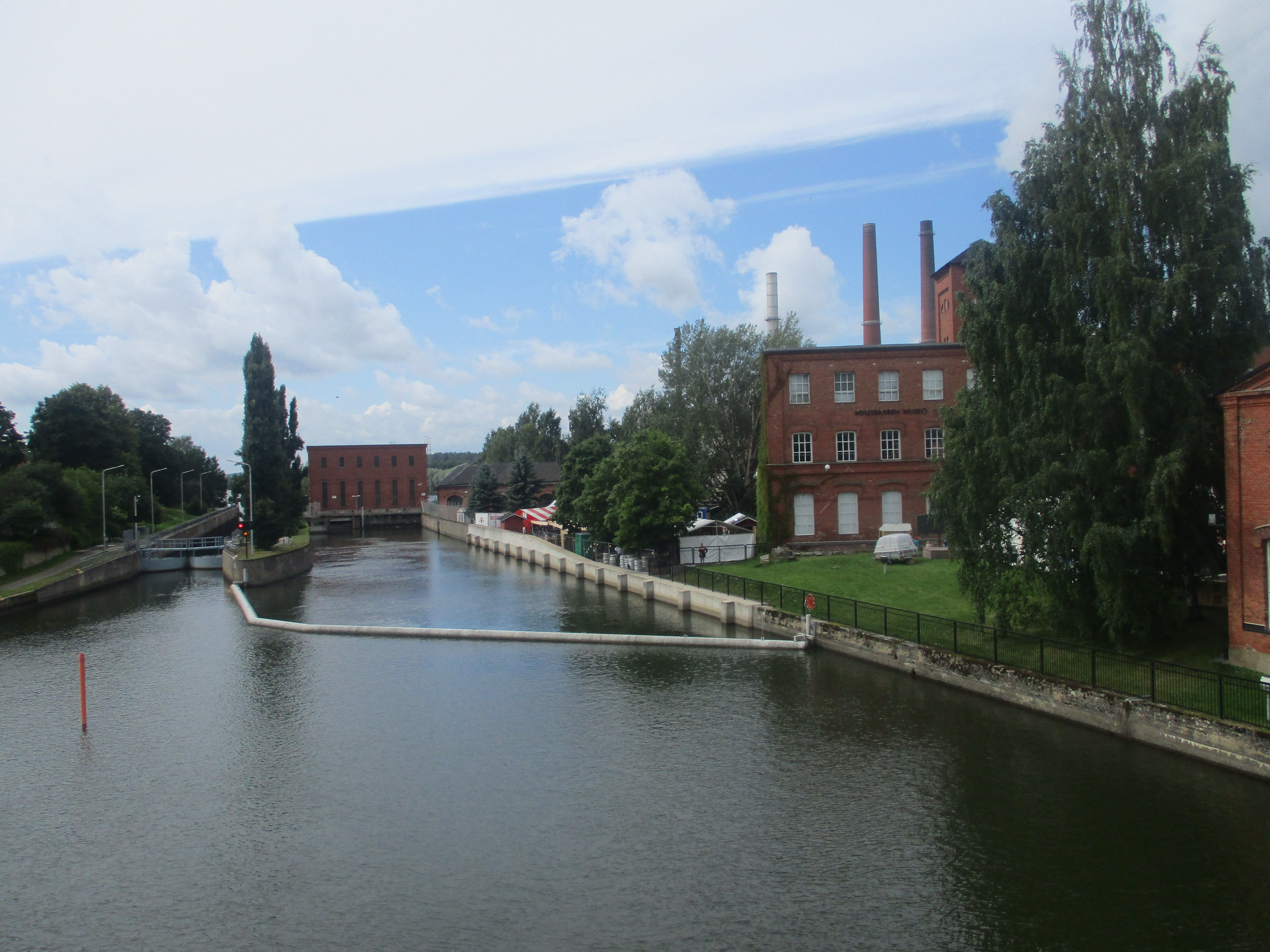 Valkeakosken kanava